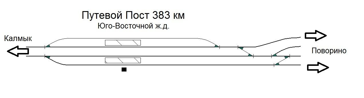 Схема Путевого Поста 383 км железнодорожной линии Лиски-Поворино